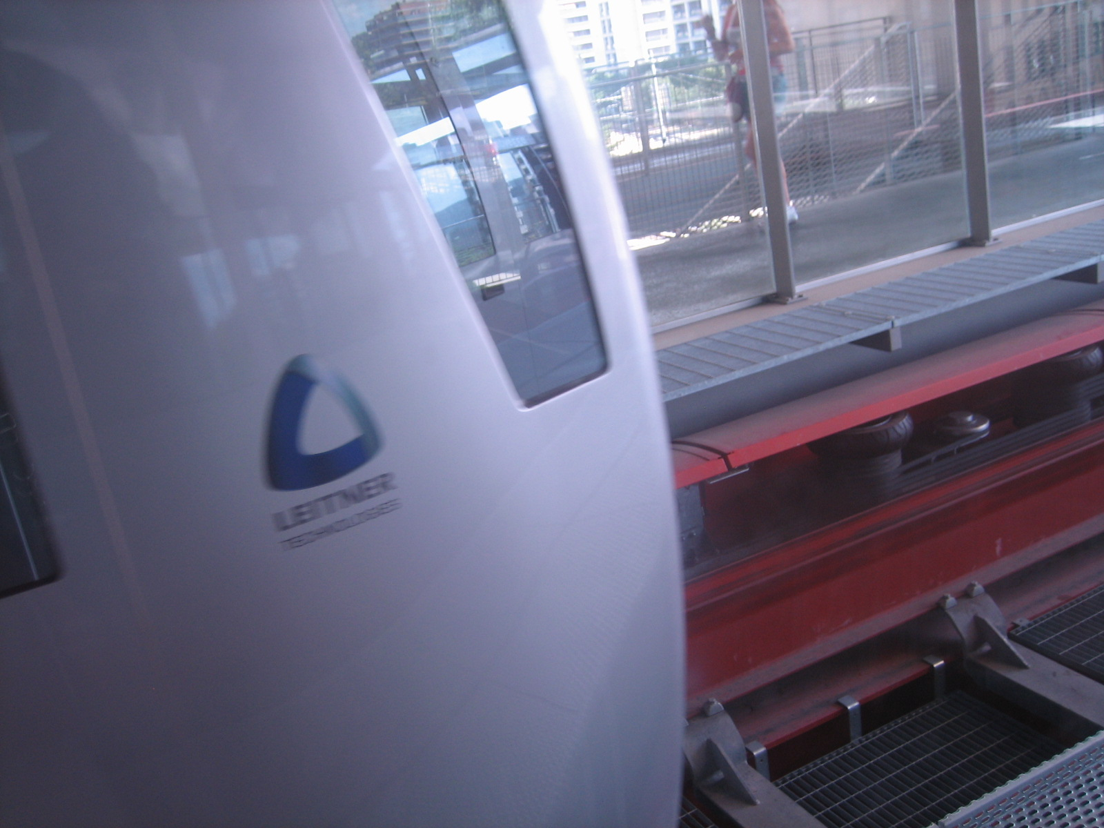 minimetro perugia, particolare con logo della casa costruttrice